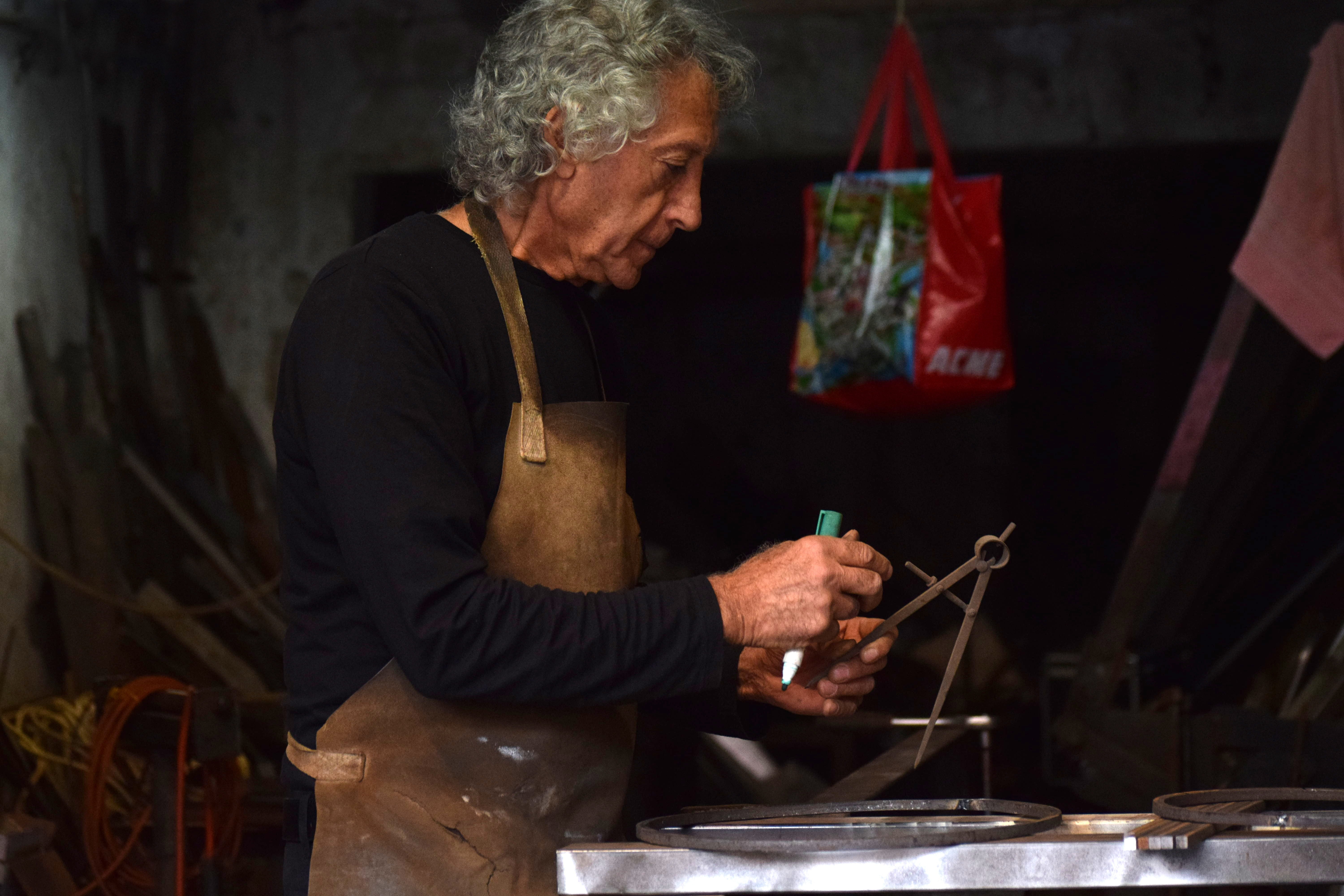 פחח , אלון פלורנטין תיכון רוטברג